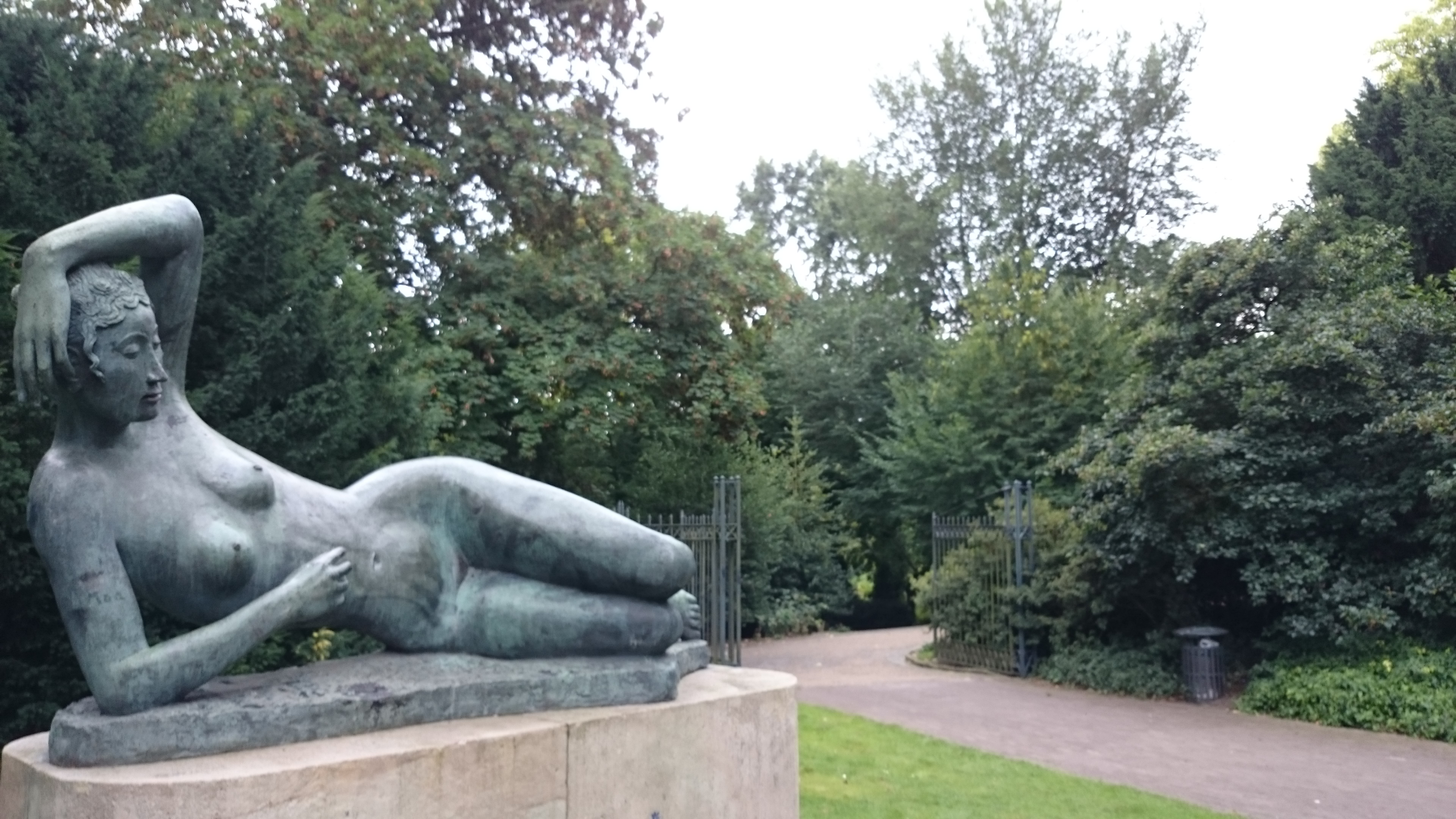 Liegende in Bremen,Das abgebildete Objekt ist ein geschütztes Kulturdenkmal in der Freien Hansestadt Bremen, mit der Nr. 1193,T009 beim Landesamt für Denkmalpflege registriert.